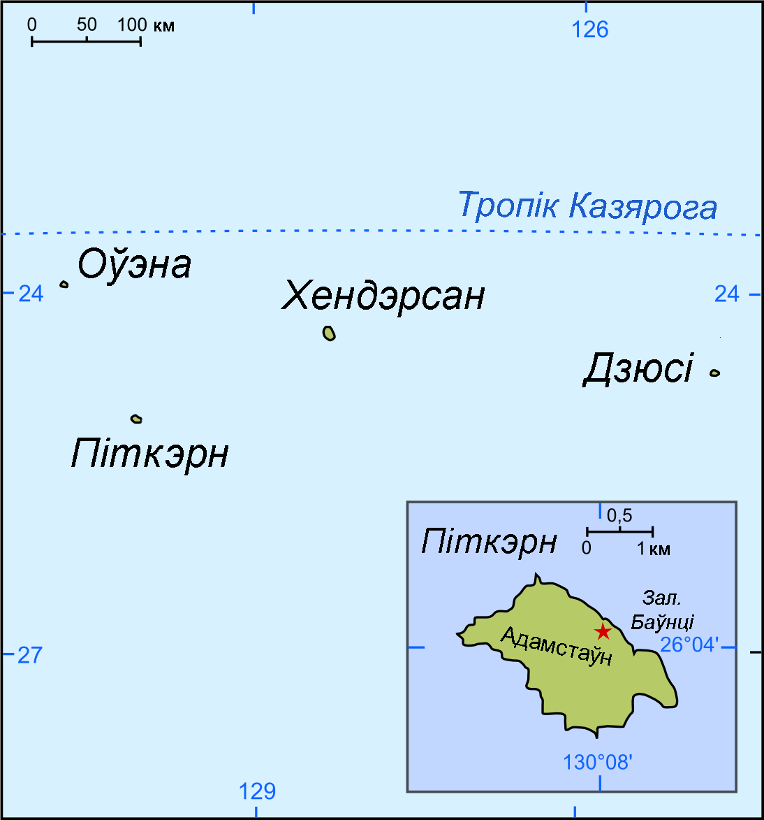 Астравы Піткерн